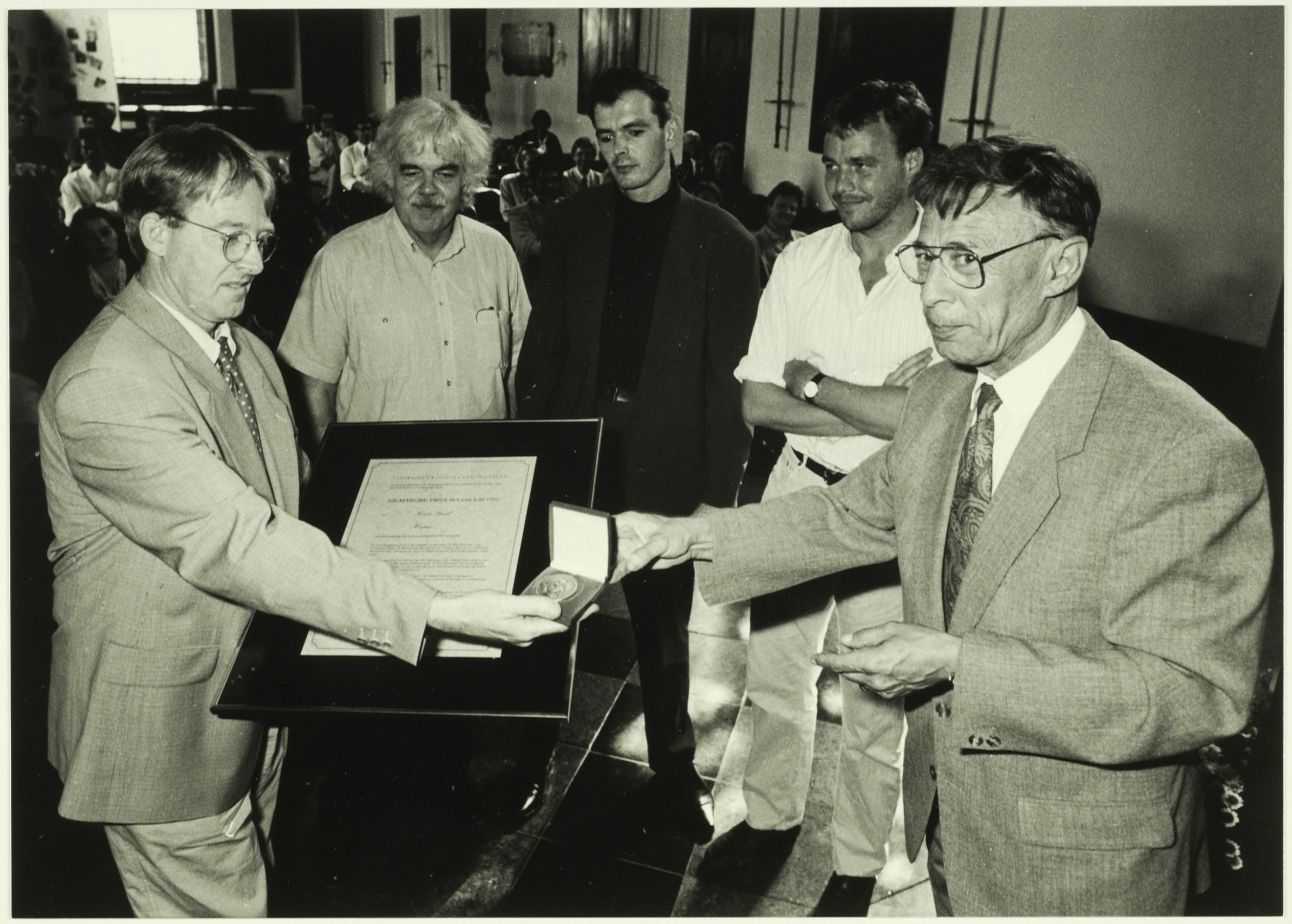 CollectieCollectie Fotoburo de BoerInventarisnummerNL-HlmNHA_5400464890BeschrijvingUitreiking grafische prijs Haarlem 1992FotonummerNL-HlmNHA_5400464890DocumenttypeHistorieprenten, tekeningen en foto'sVervaardigerBoer, Poppe de Soort vervaardigerFotograaf LandNederland ProvincieNoord-Holland GemeenteHaarlem PlaatsHaarlem Begindatum1992Einddatum1992TechniekFoto Plaatsinggb42